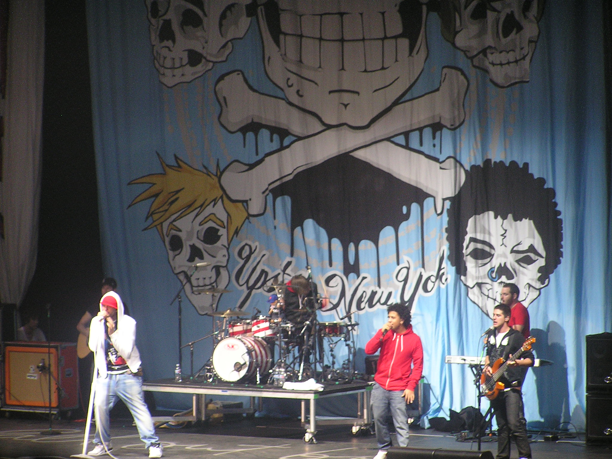 Gym Class Heroes @ San Diego, 1 Decembre 2007